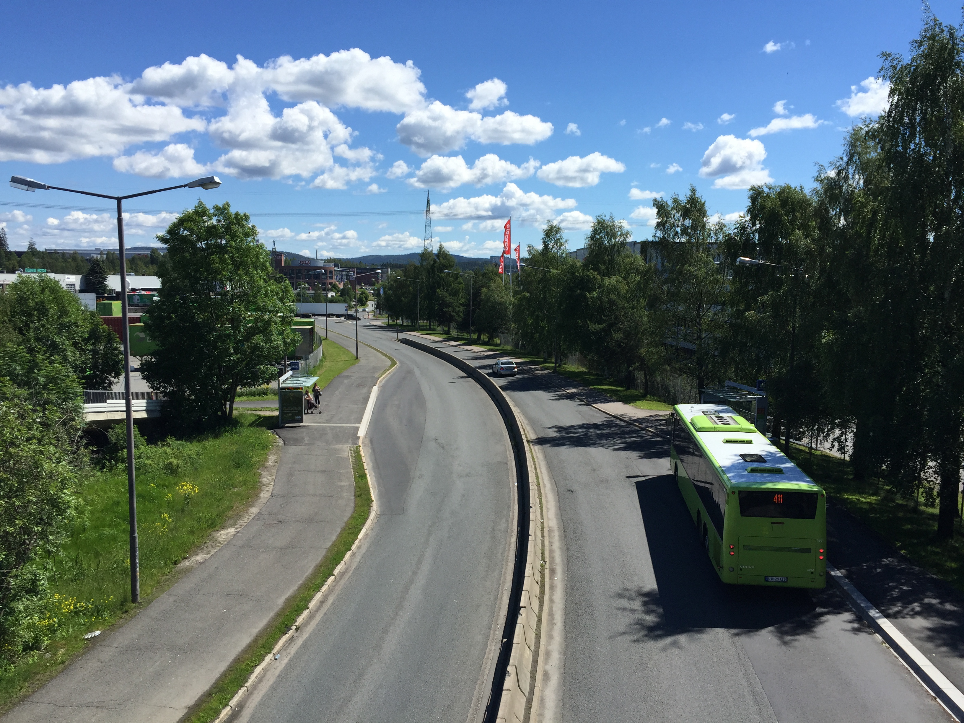 Karihaugveien i Oslo.